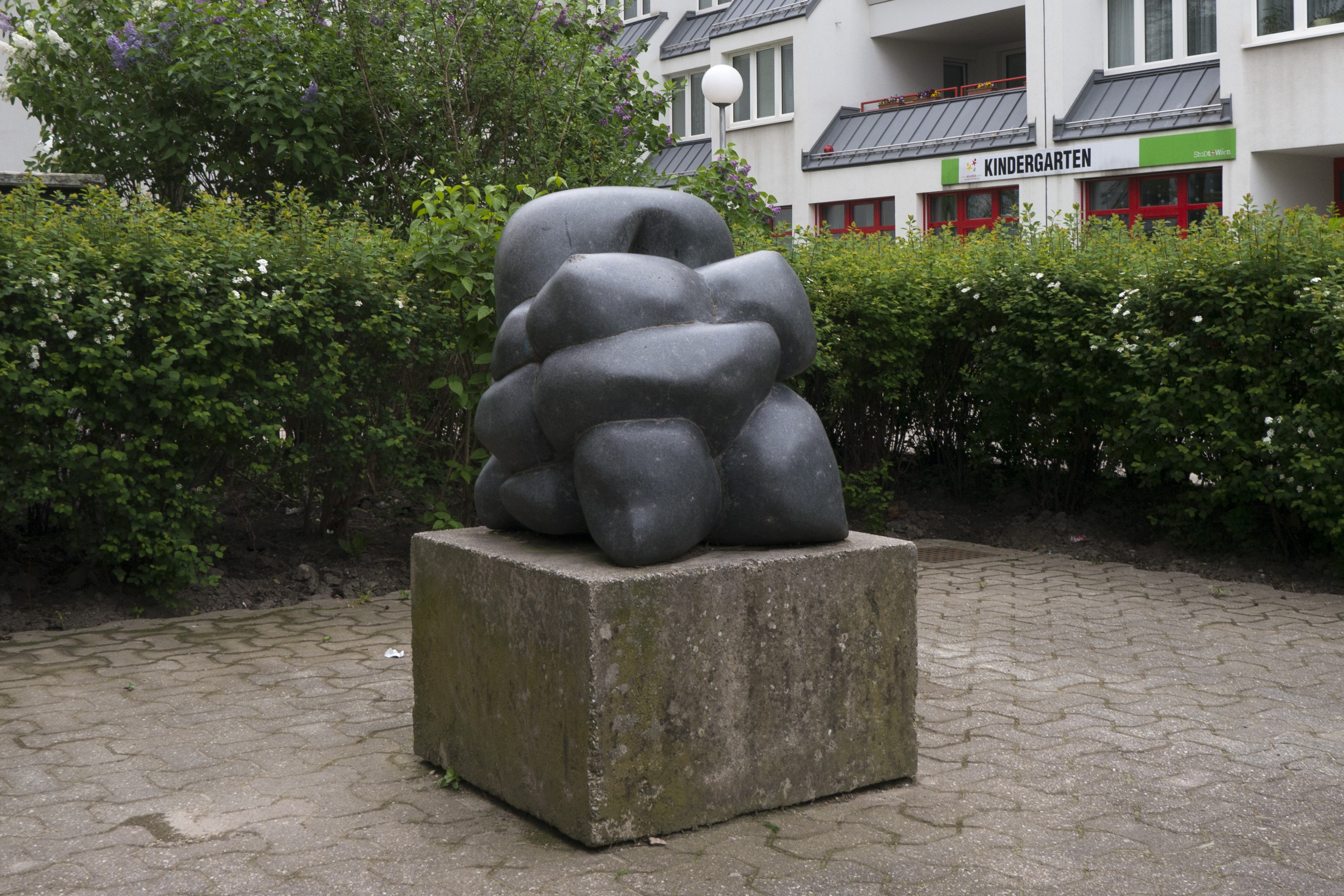 Plastik "Eingeschnürte" This media shows the Vienna residential building (Gemeindebau) with the ID 1525. This media shows the Vienna residential building (Gemeindebau) with the ID 4.